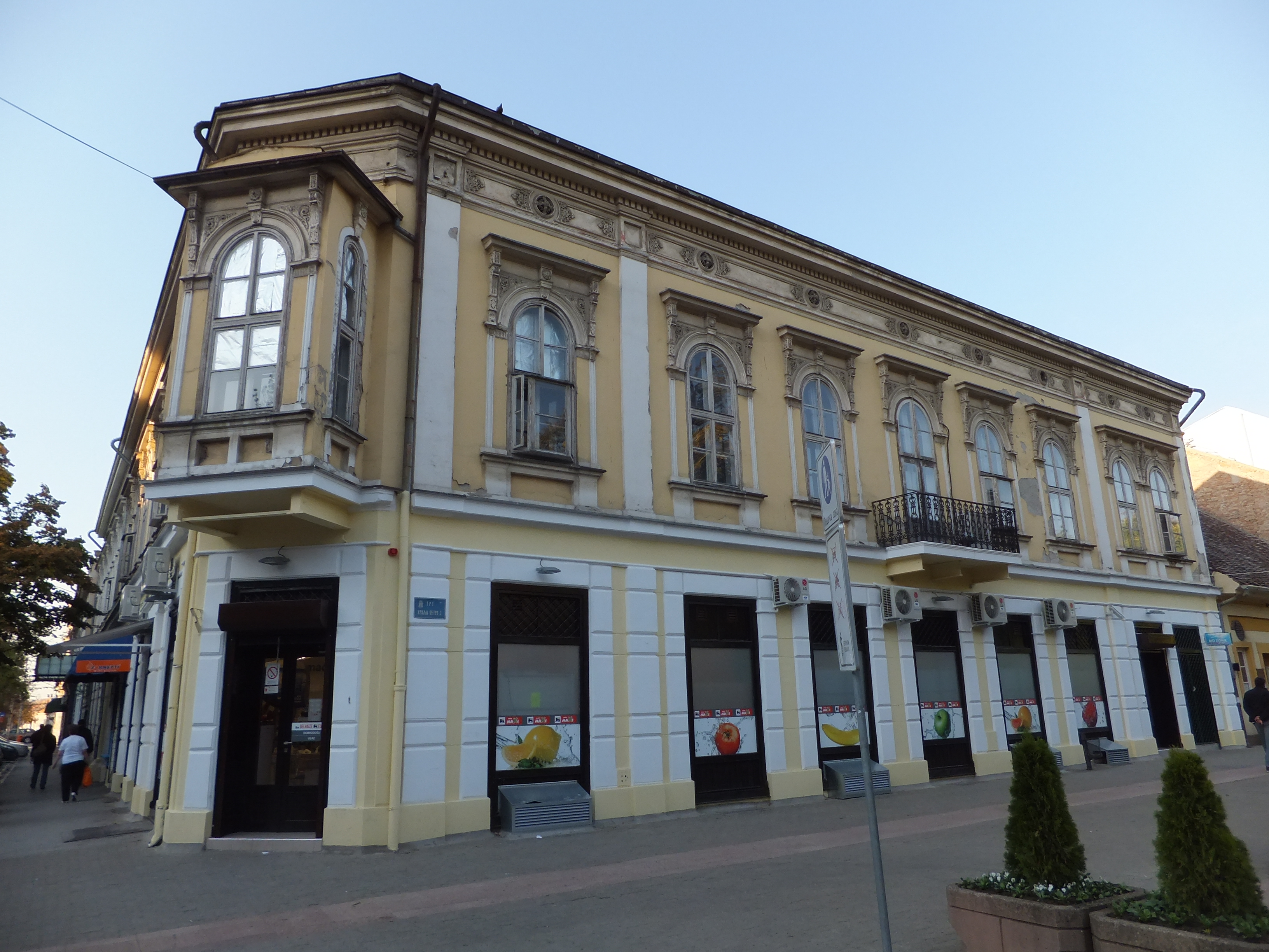 Зграда у Димитрија Туцовића 2 у Панчеву